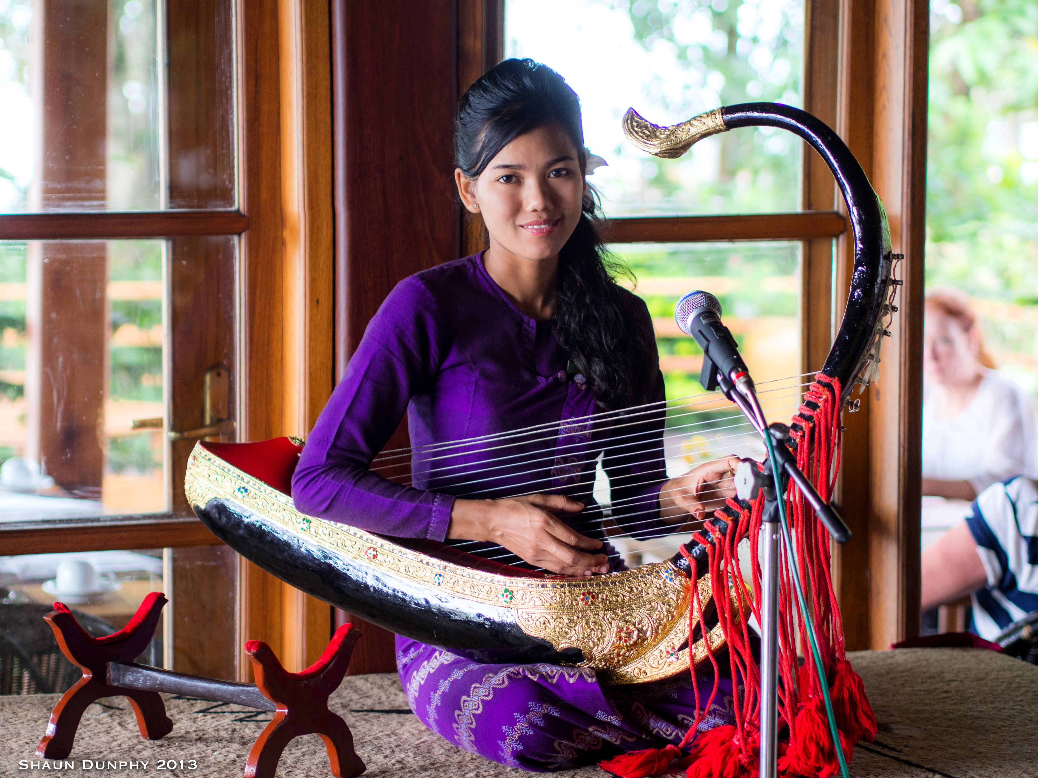 Burmese Harp player, Mount Popa, Myanmar